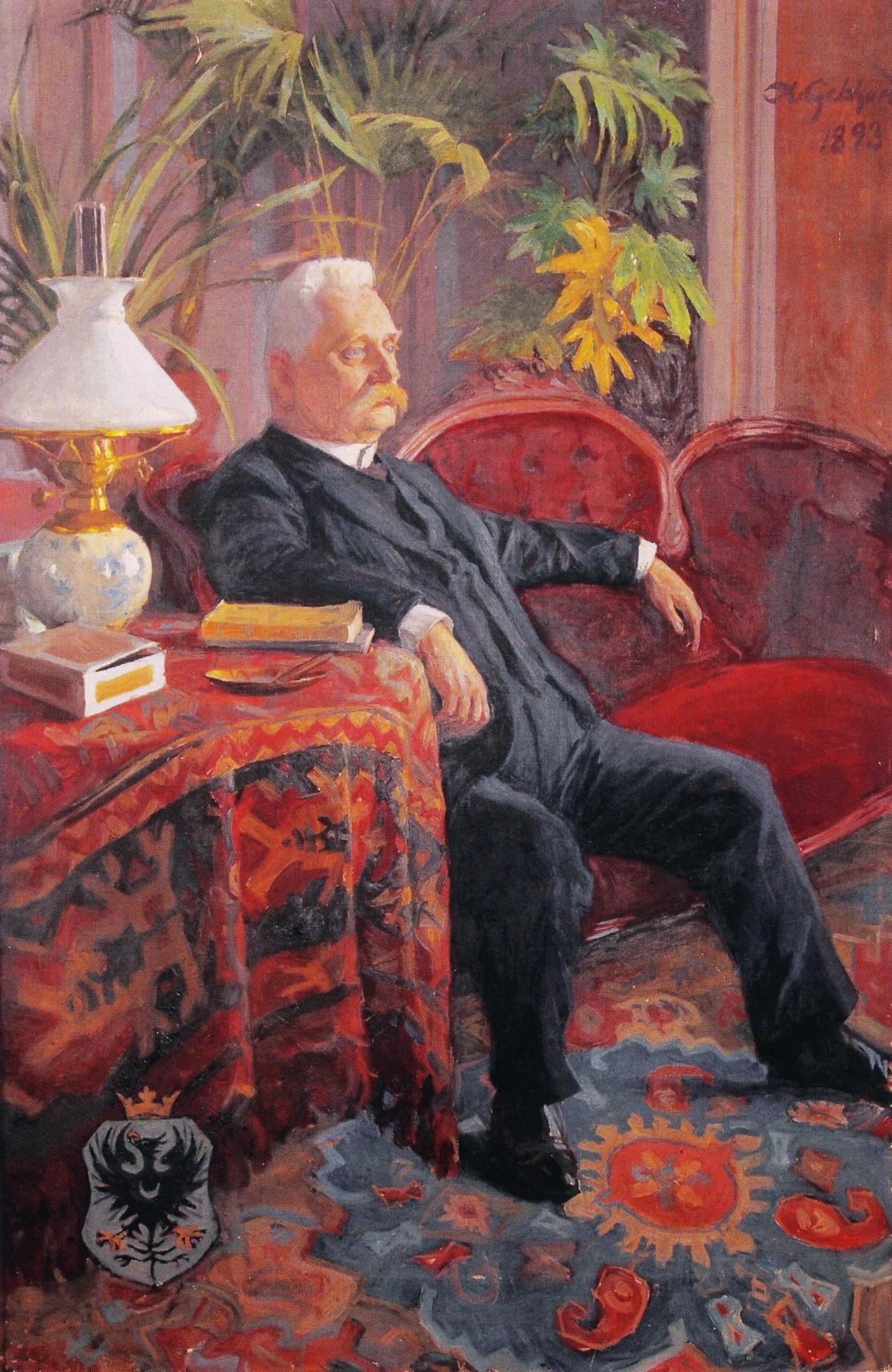 Anders Gustaf Ramsay (1832–1910). Muotokuva kuuluu Espoonkartanolle.